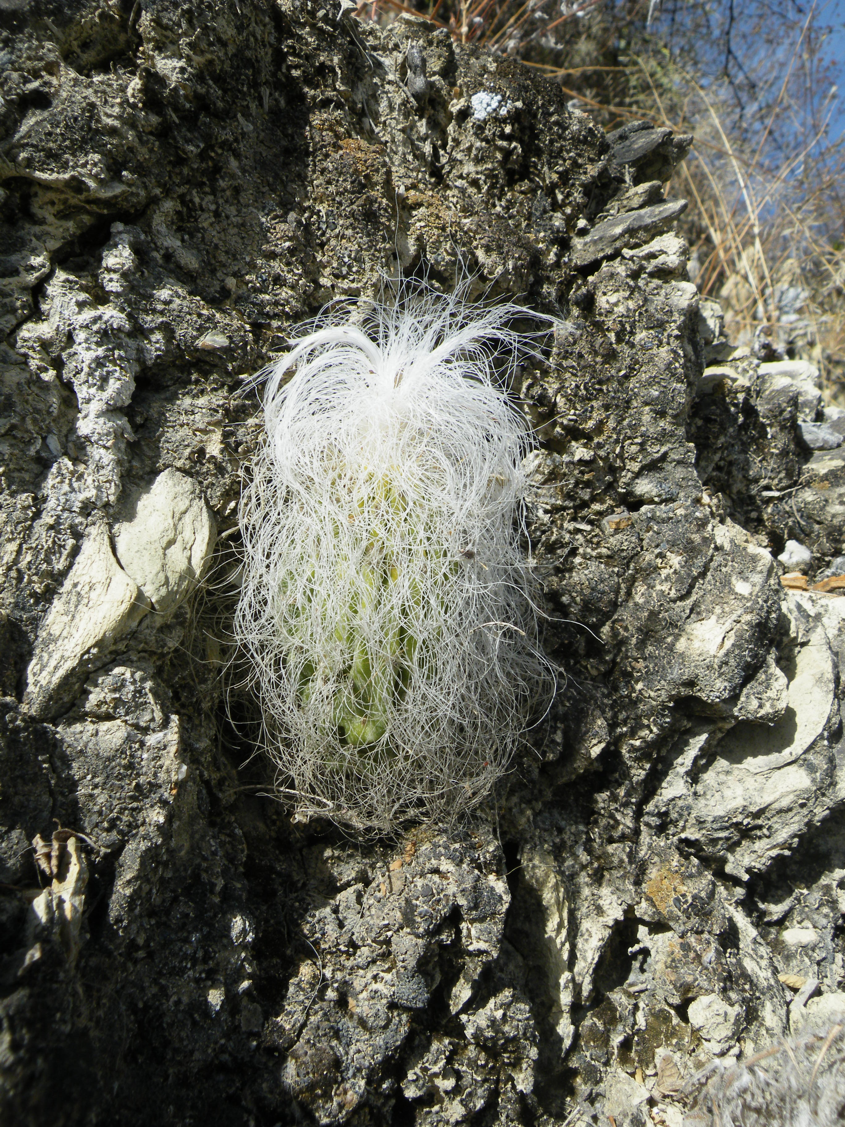 Near Rio Venados, Hidalgo